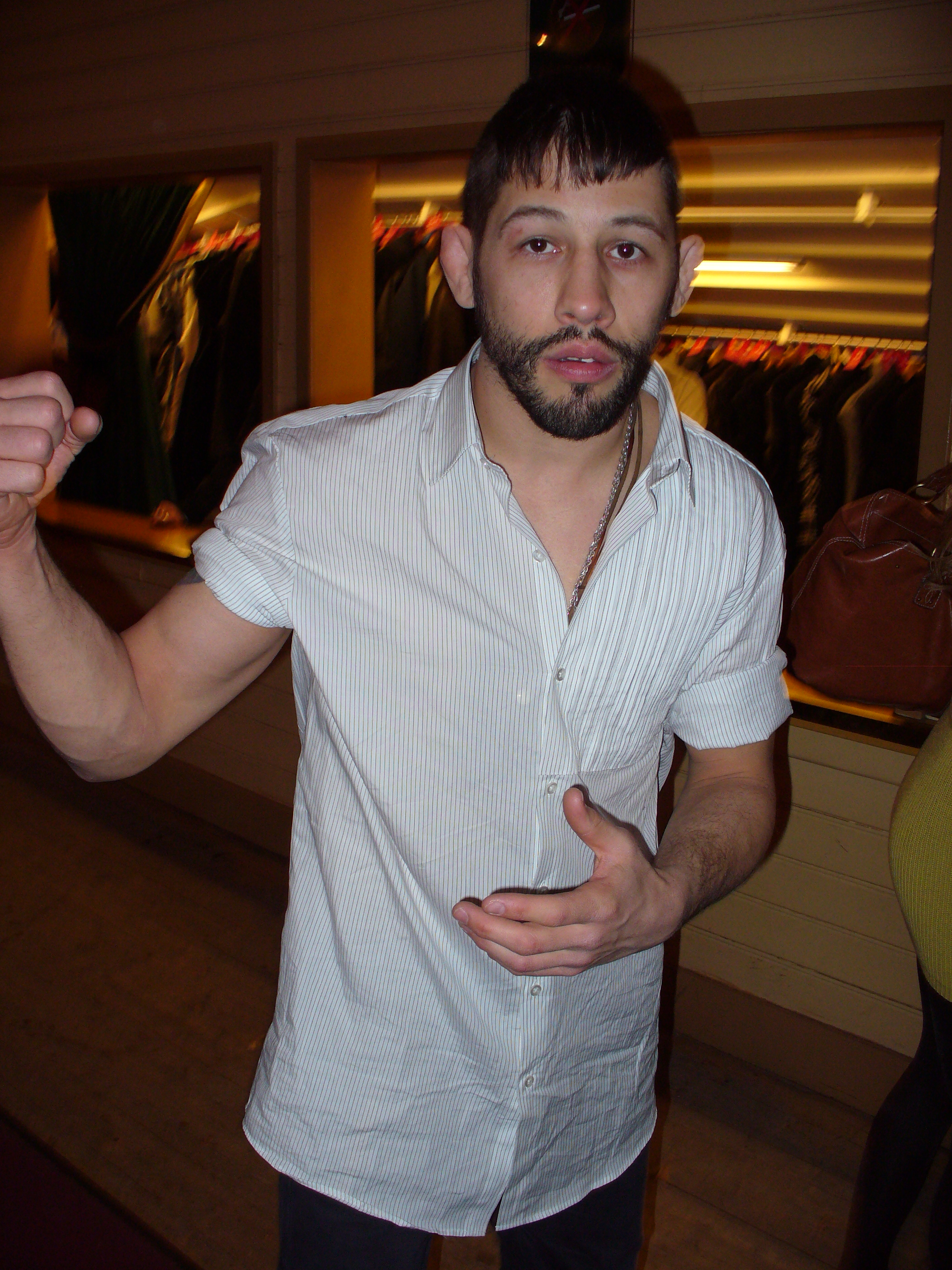 Musse Hasselvall at Aftonbladet TV Awards, 2007